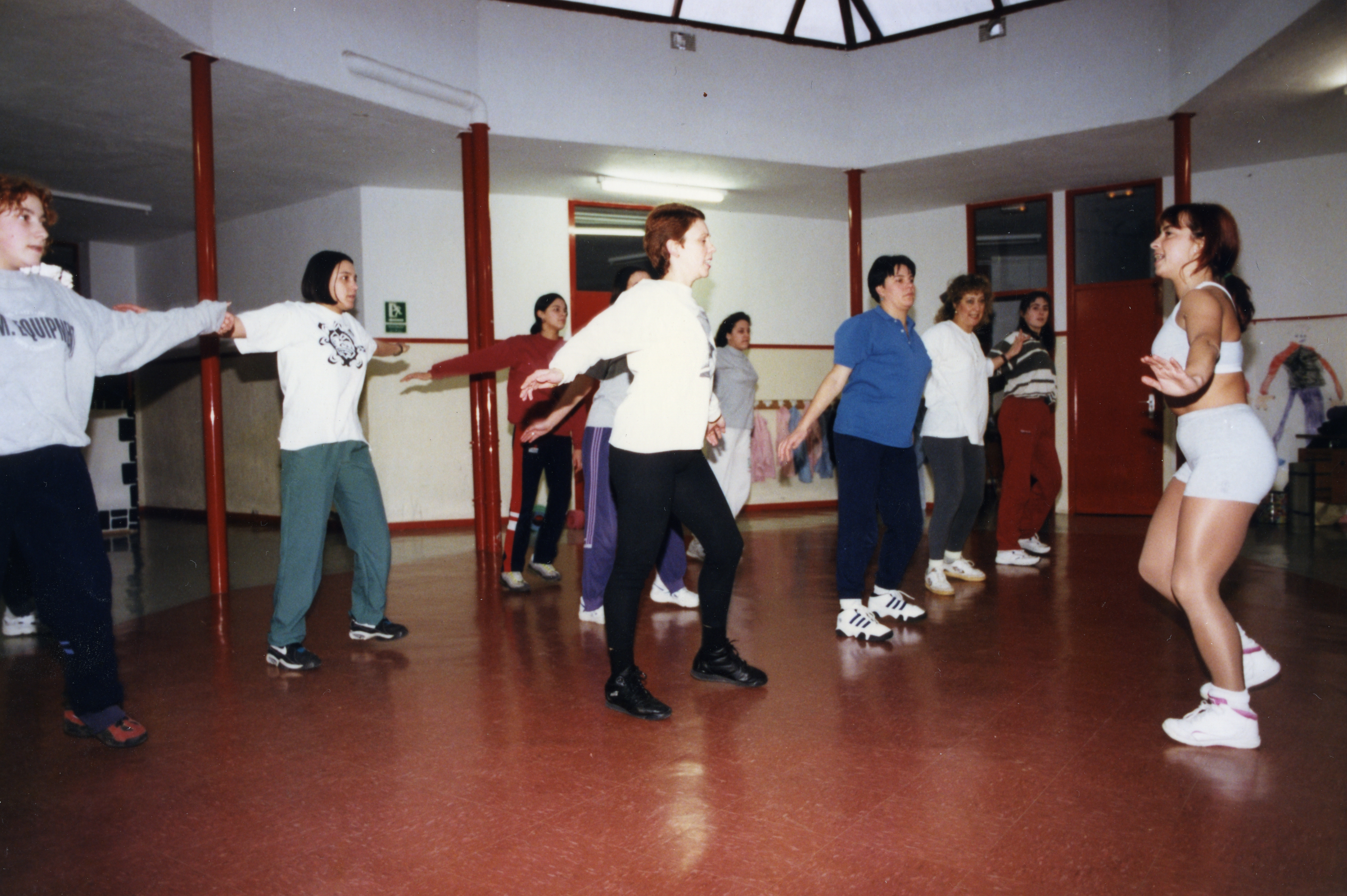 Aiurri 51 zbk. 7. orr.